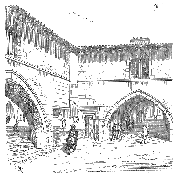 ... Établir la circulation sur les côtés d'une place et laisser le milieu en dehors de cette circulation a toujours été la préoccupation des planteurs de villes du moyen âge. Des pans coupés, ménagés aux retours d'équerre des maisons d'angle, permettent aux chariots d'entrer dans la place facilement les jours de marché. Nous présentons (18) le plan d'un quart de la place de la bastide de Montpazier, et (19) la vue perspective d'une des entrées de cette place prise du point A du plan. On voit dans cette figure comment les angles des maisons sont portés en encorbellement au-dessus des larges pans coupés qui donnent entrée diagonalement sur la place ...